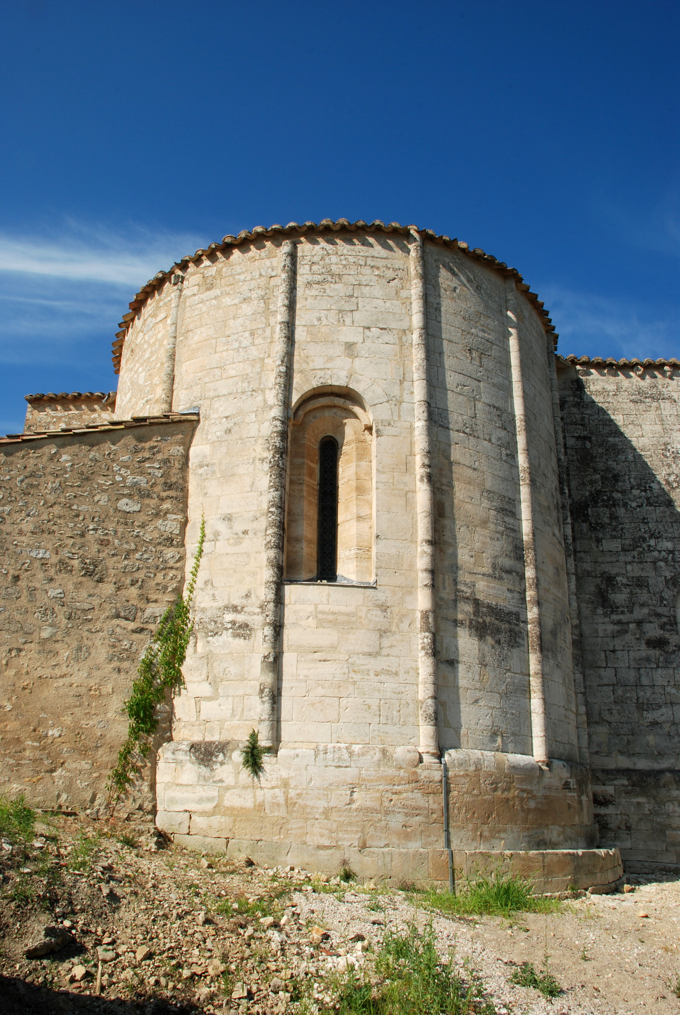 France - Languedoc - Hérault - Église de Saint-Vincent-de-Barbeyrargues